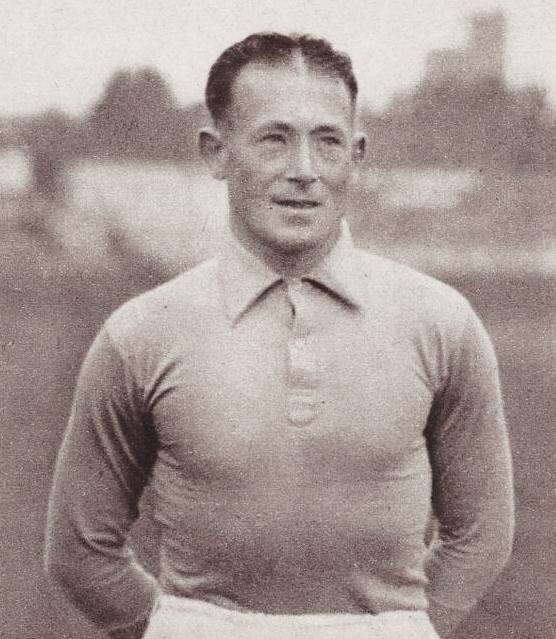 Étienne Mattler en octobre 1937.